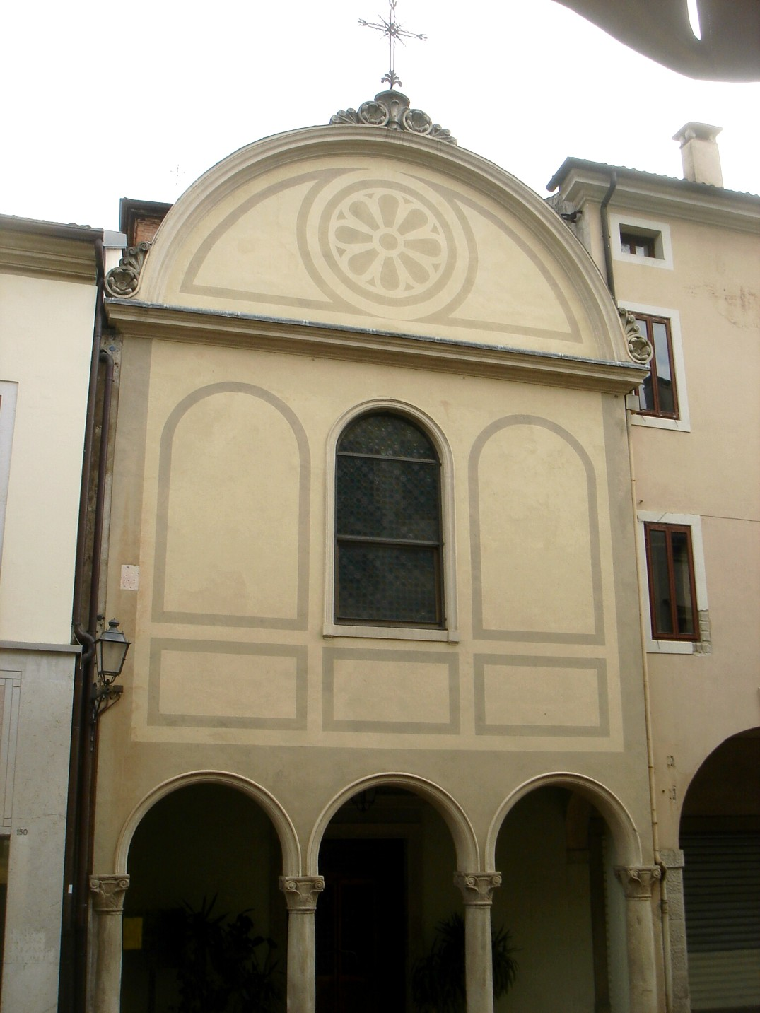 Conegliano: facciata dell'Oratorio seicentesco della Madonna della Salute in via XX settembre.